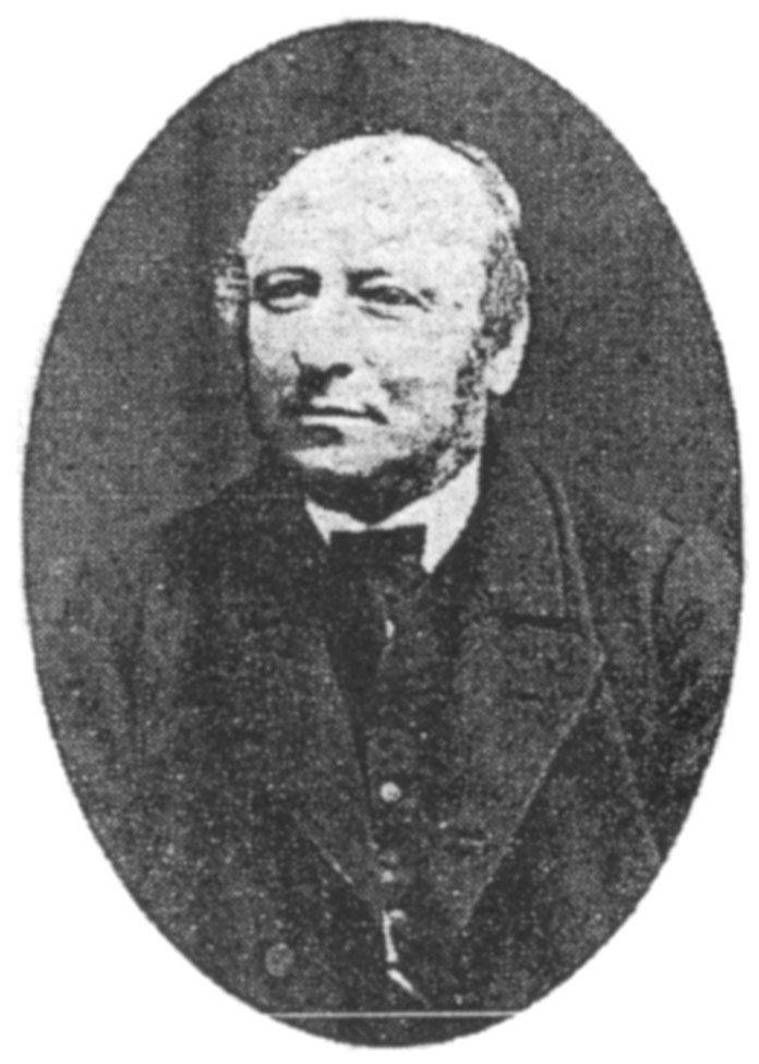 Jakob Friedrich bengel (1817-1878), Schultheiß in Treschklingen und Mitglied des badischen Landtags